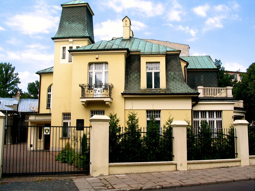 Willa Oskara Zieglera w Łodzi